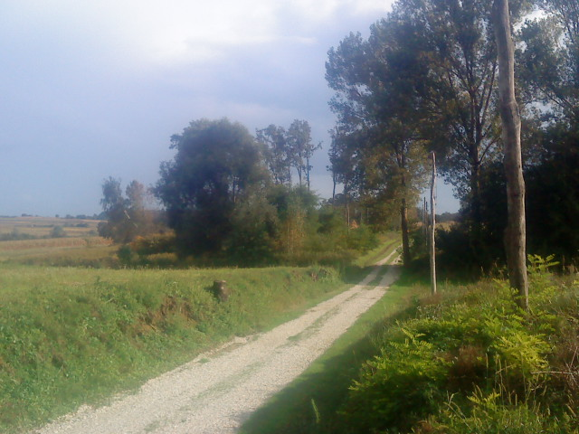 put od glavne ceste prema Lepševcu